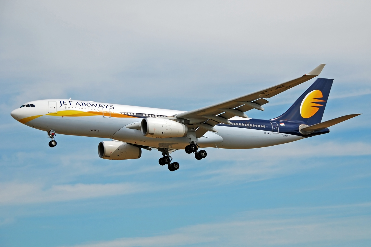 Airbus A330-243 Brussels - Zaventem [BRU / EBBR] 16-08-2008